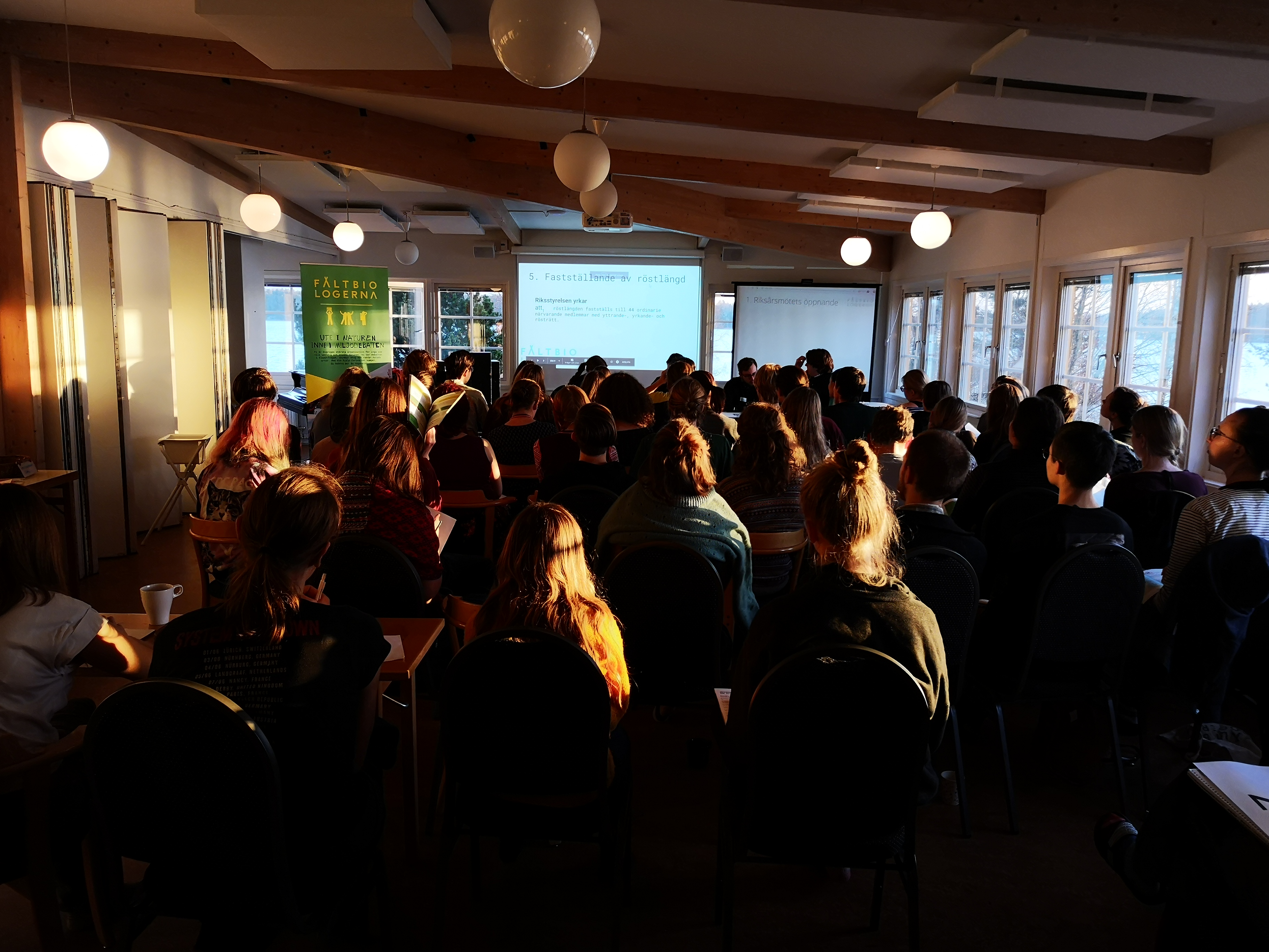 Fältbiologerna, svensk natur- och miljöförening för barn och unga, har riksårsmöte (RÅM) år 2019. Bilden visar början av deras årsmötesförhandlingar, i Bro, Stockholms län.